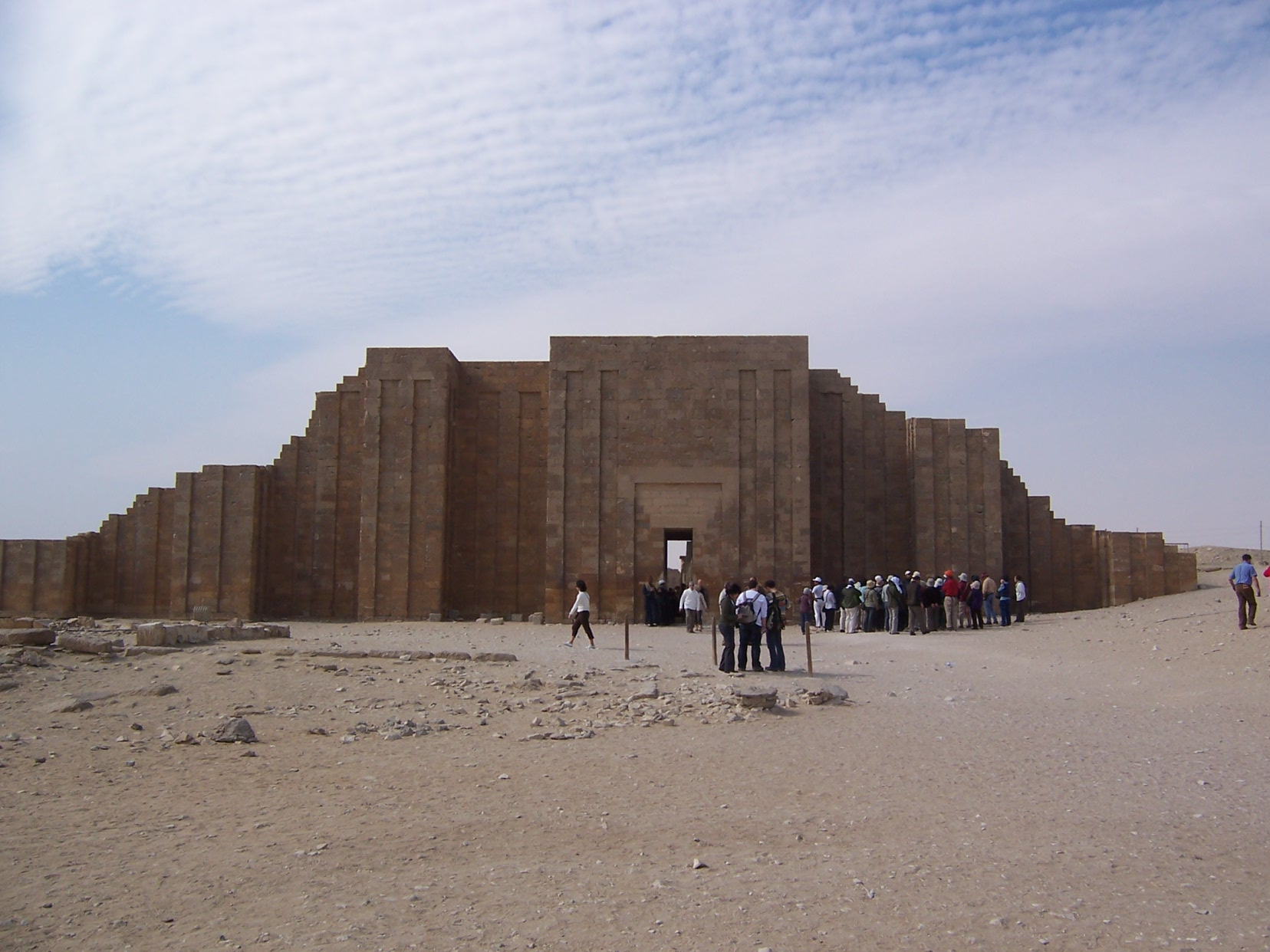 Pictures from Saqqara, Egypt